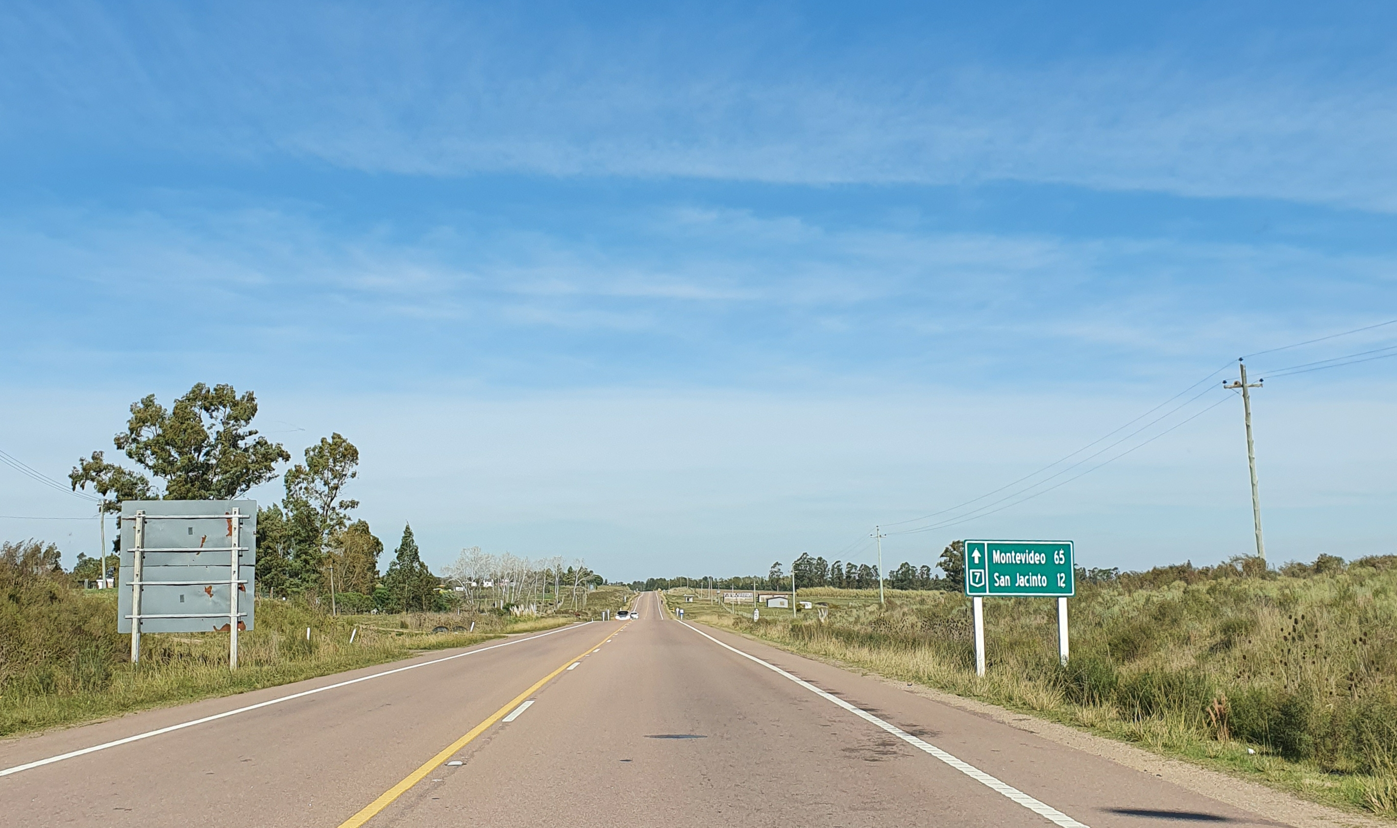 Ruta 7 km 65, departamento de Canelones, Uruguay. Próximo a la ruta 81.